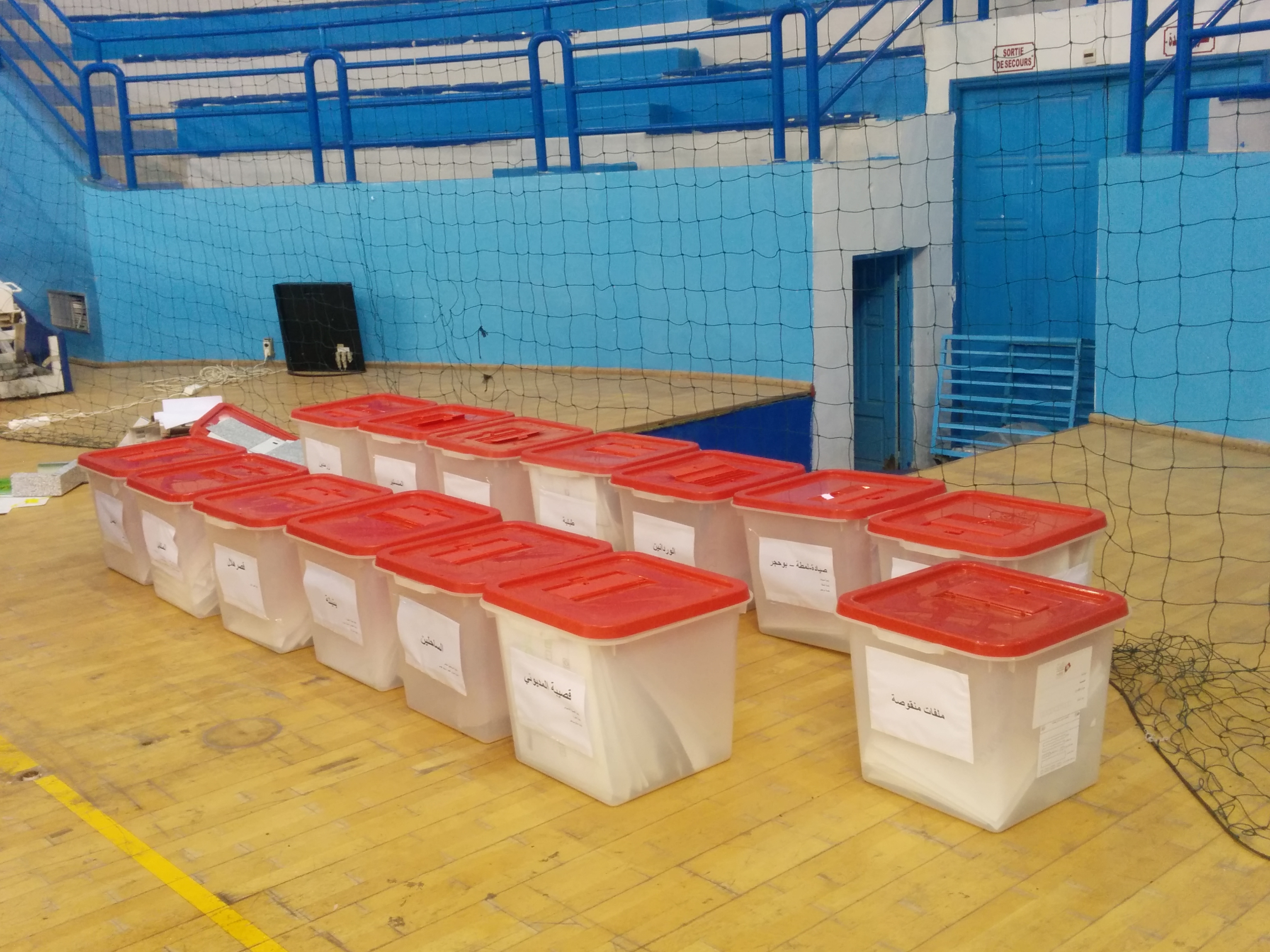 Urnes pour la collecte des dossiers de candidatures pour les élections municipales de 2018.